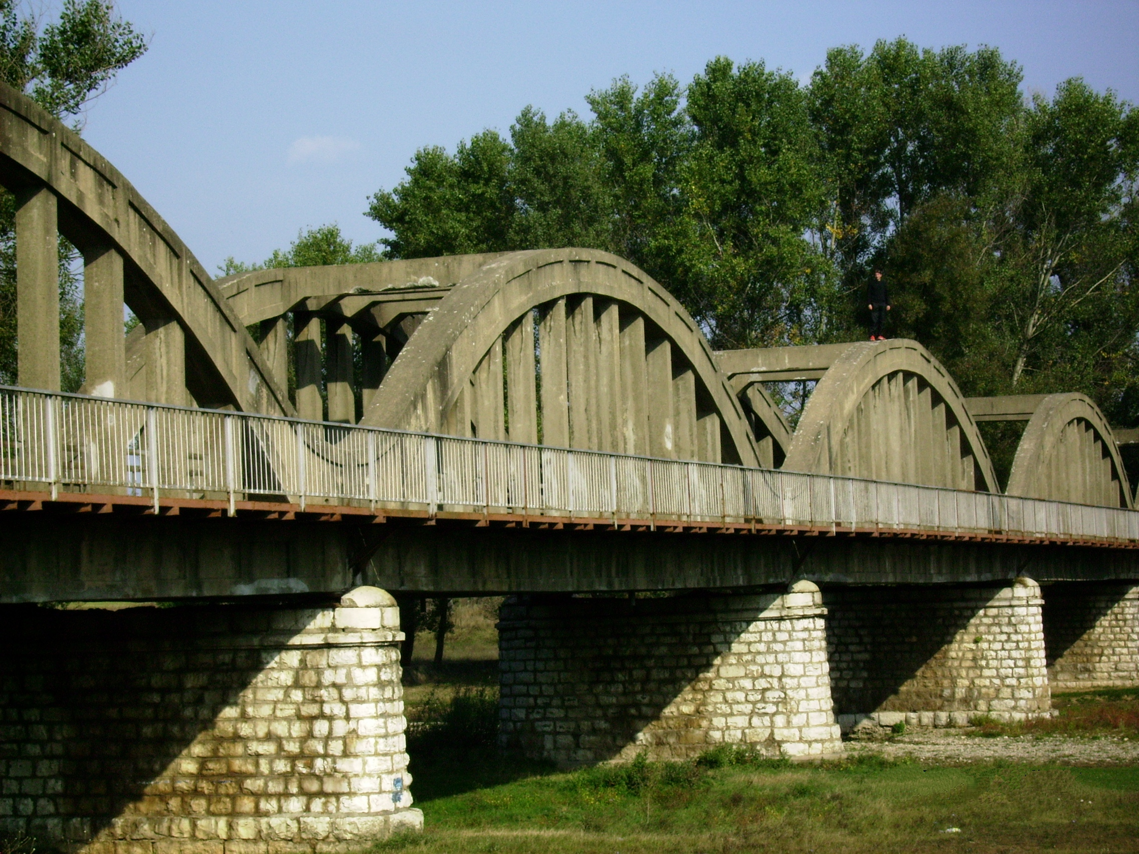 Мостът на река Лом в село Крива бара (Област Монтана), България.